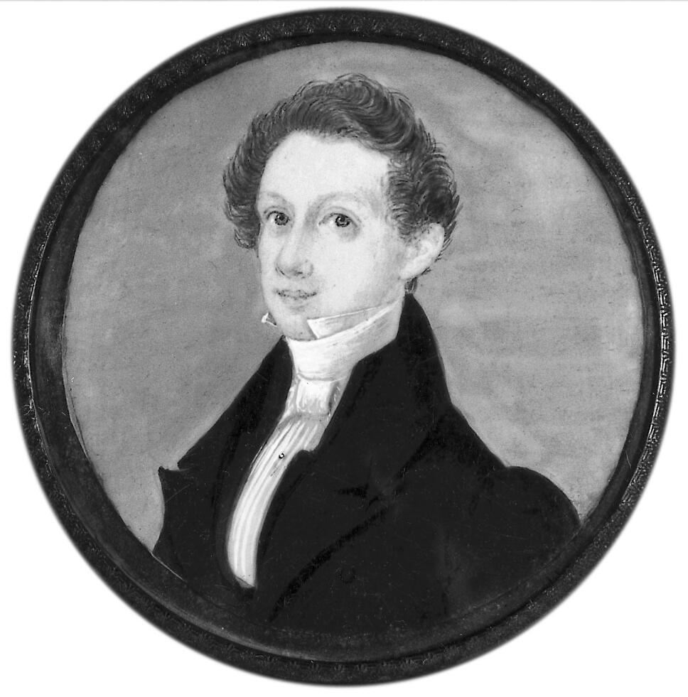 Portret van de burgemeester van Bleiswijk Jacob Isaac van Waning (1815-1843)